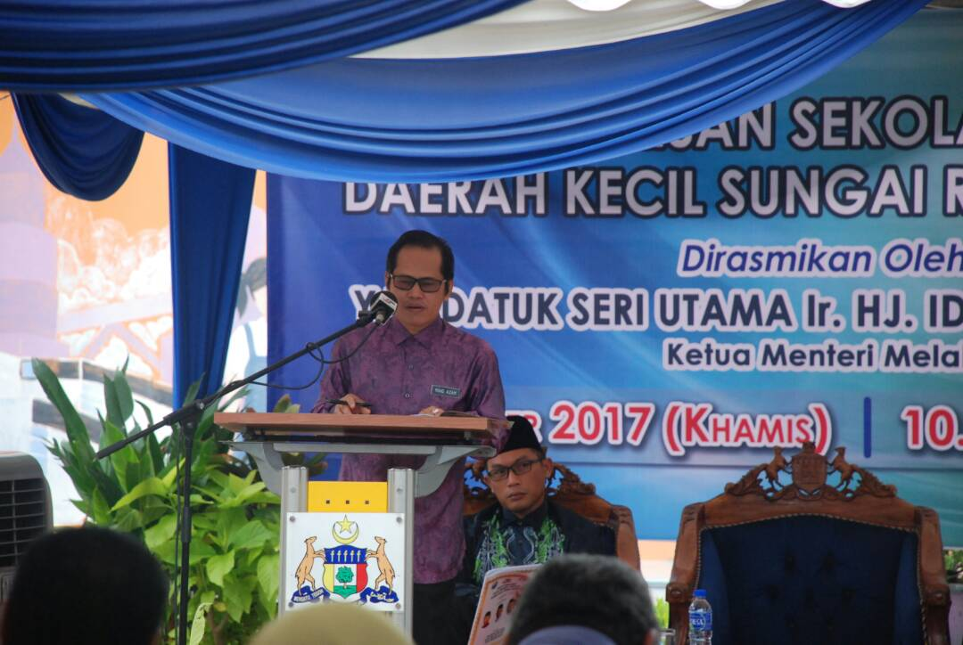 Ucapan oleh Tuan Dr. Mohd. Azam Bin Ahmad, Pegawai Pendidikan Daerah Jasin, Melaka